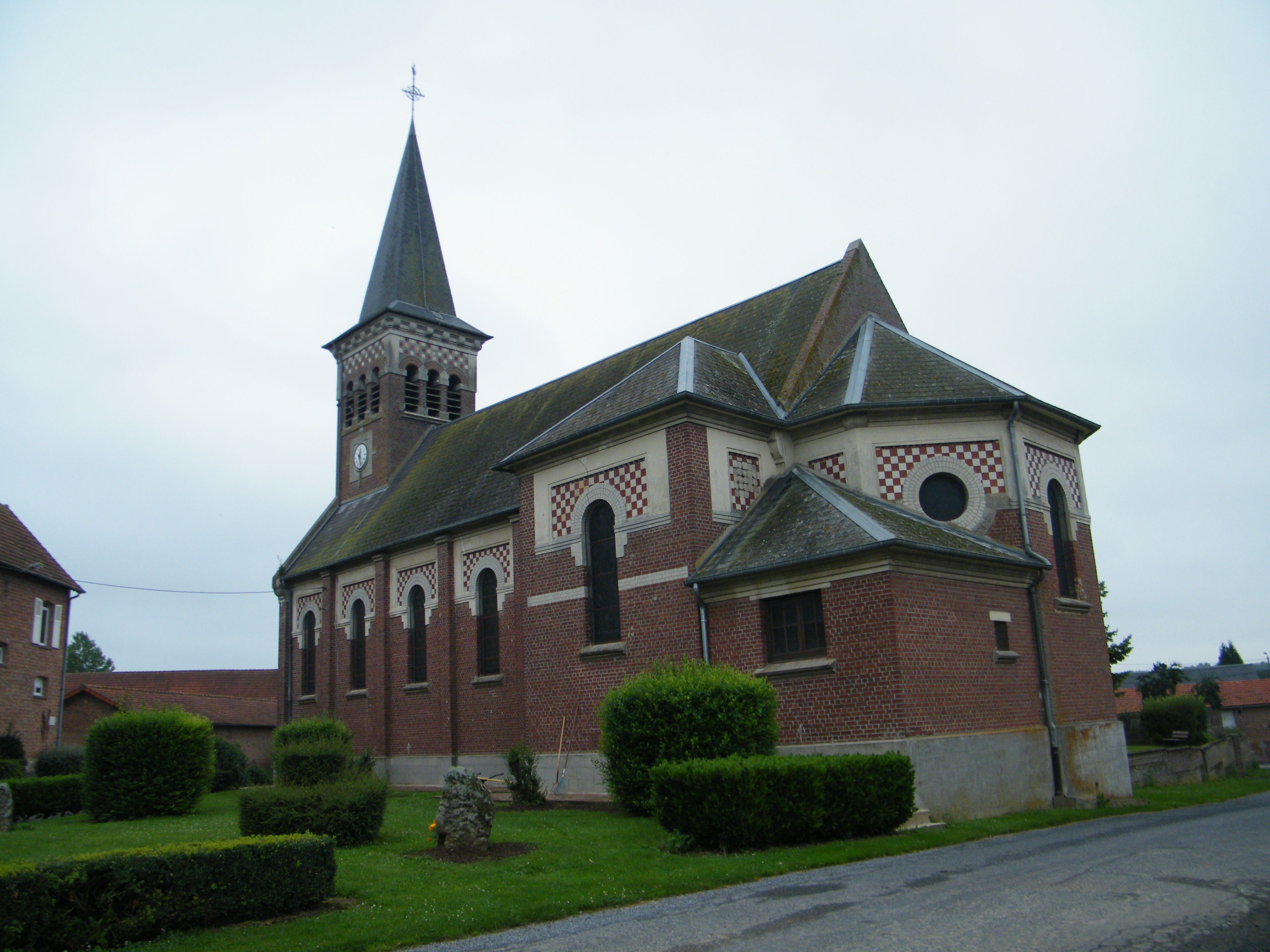 Église Saint-Vaast de Misery (Somme).